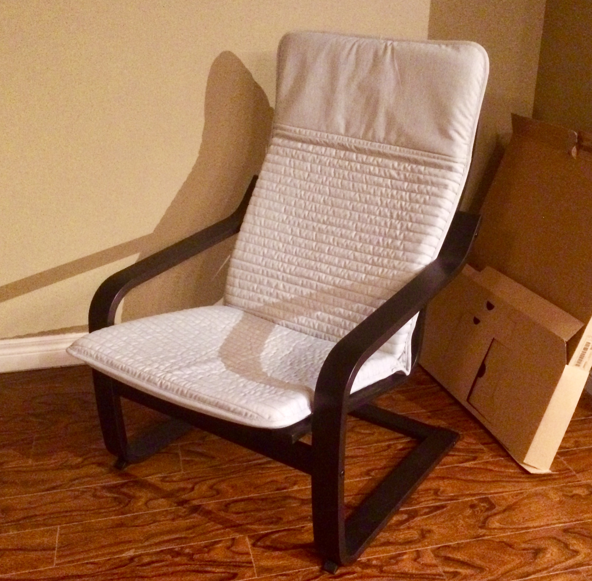 POÄNG in “Knisa Beige”